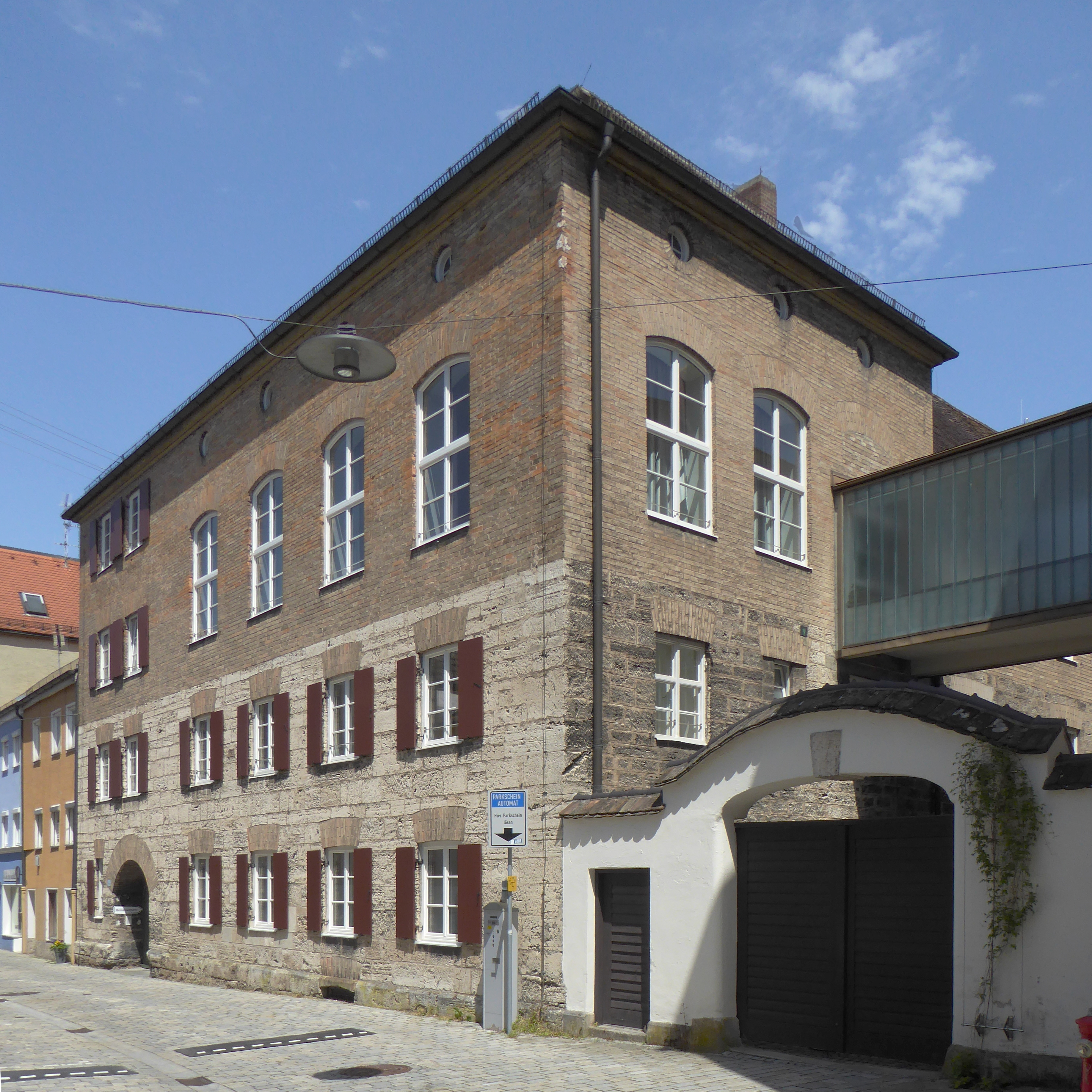 Weilheim in Oberbayern, Hofstraße 19/21 (Finanzamt).